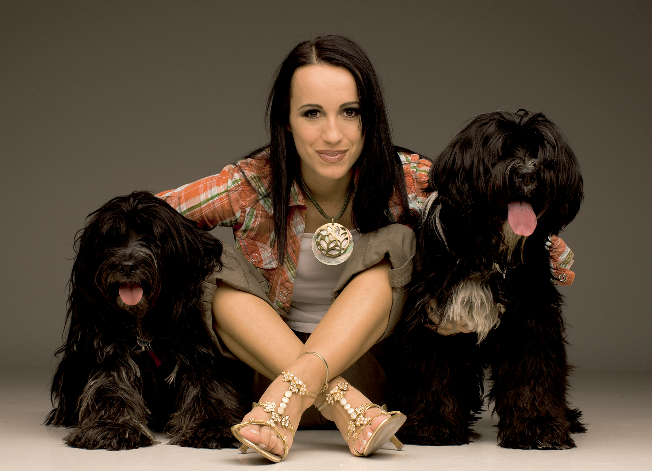 Pressefoto Nina Stern